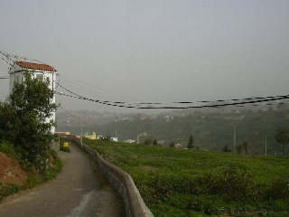 El Monte Lentiscal en un día con calima. Imagen tomada por Simón Hernández Dalmau el 17 de enero de 2005 a las 15:30 en Las Meleguinas, Santa Brígida (Gran Canaria). Categoría:España (imagen) Categoría:Fotografía (imagen)